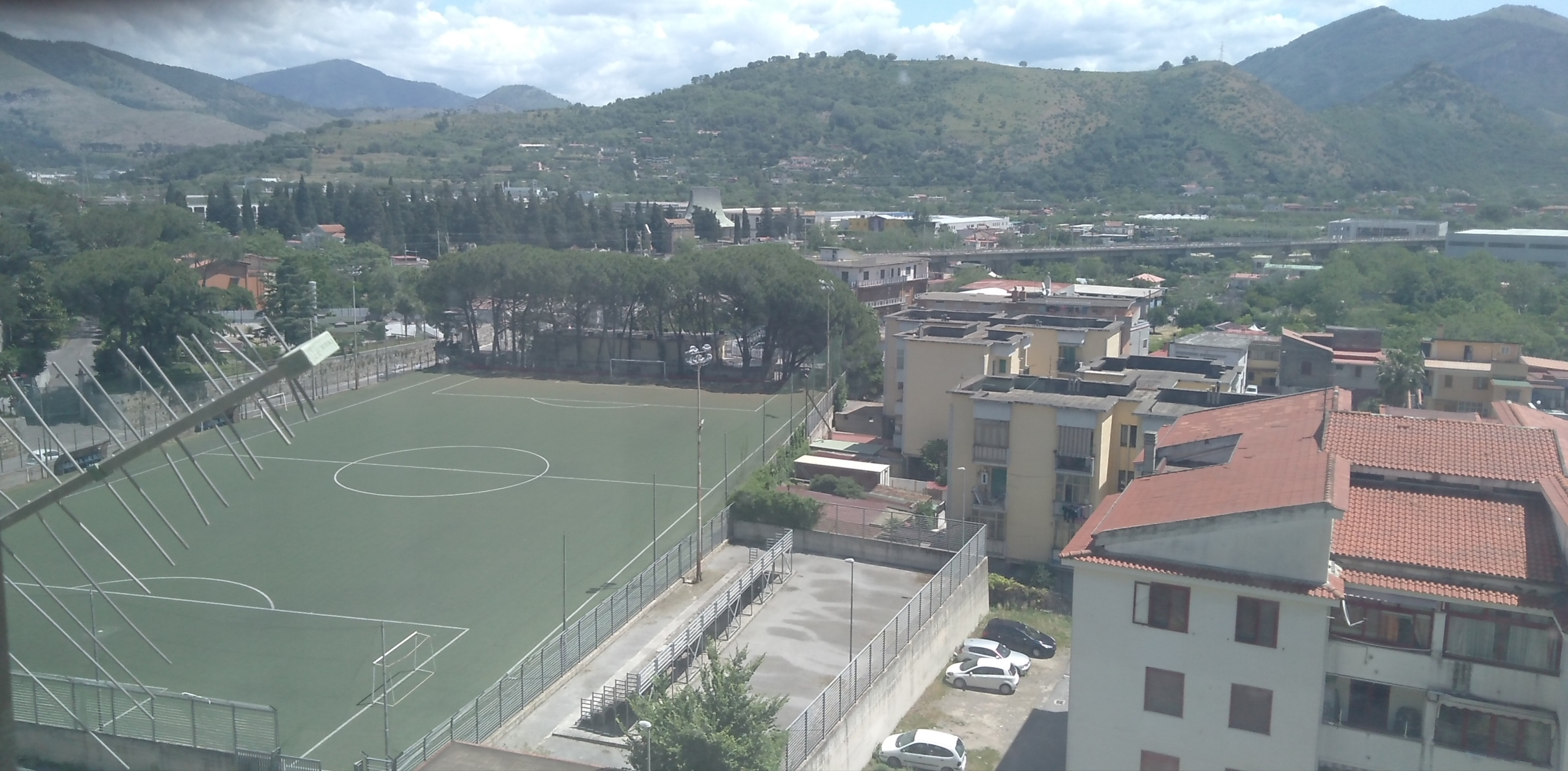 Vista del Campo sportivo di Piedimonte, secondo impianto sportivo della città di Nocera Inferiore